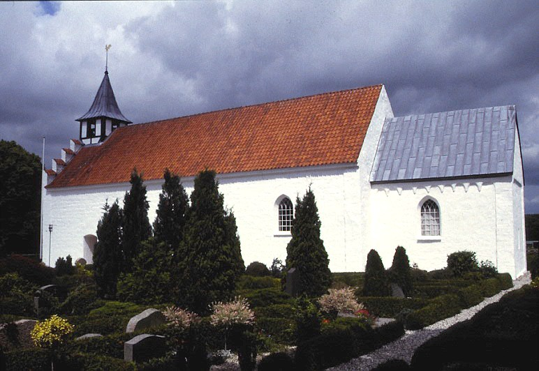 Kirken set fra syd Grundfør kirke ligger i Grundfør Sogn i det tidligere Vester Lisbjerg Herred Århus amt, nu Favrskov Kommune, Region Midtjylland Kirken var i middelalderen viet til Johannes Døberen .